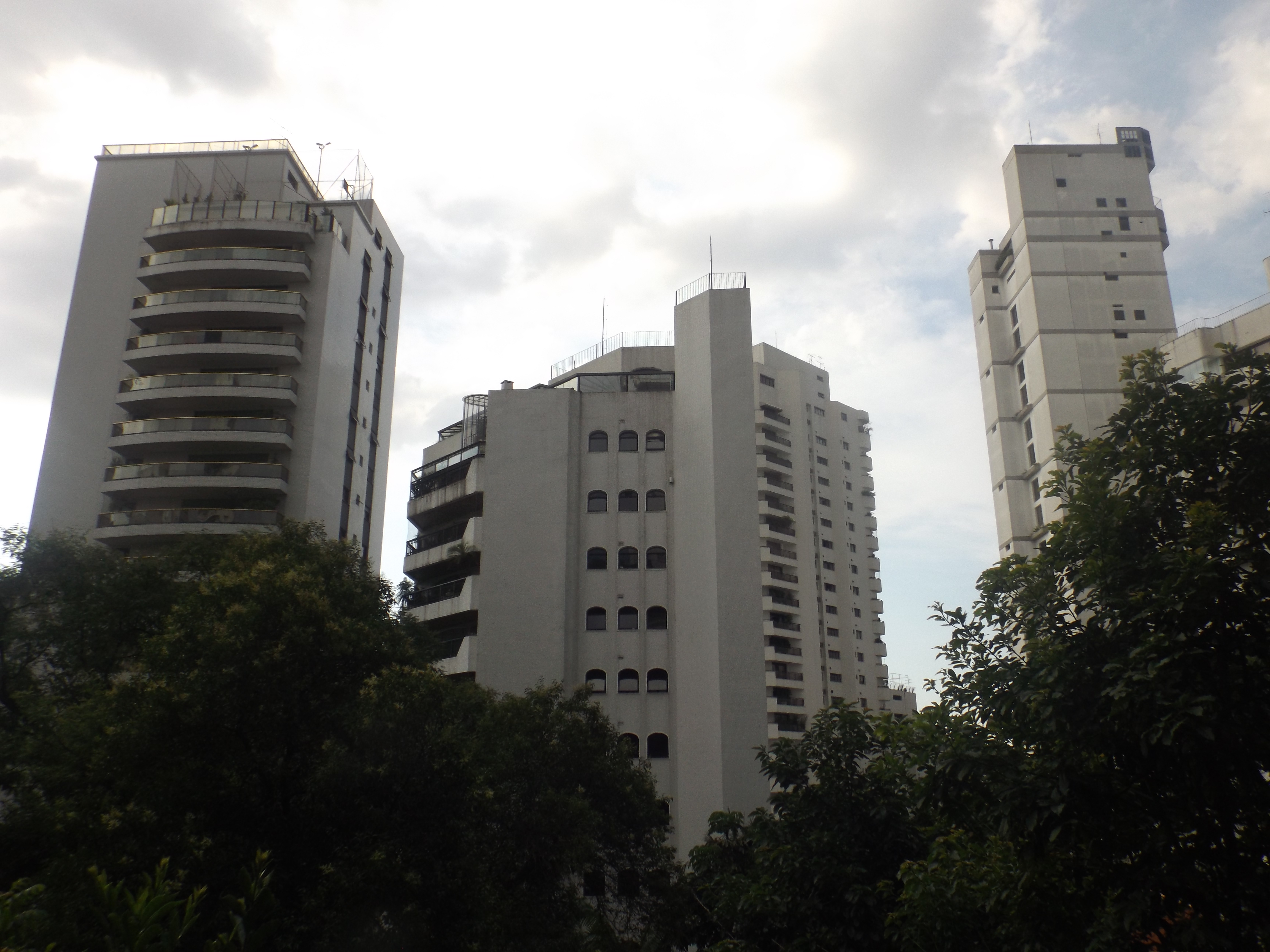 Praça Esther Mesquita e prédios do bairro de Higienópolis